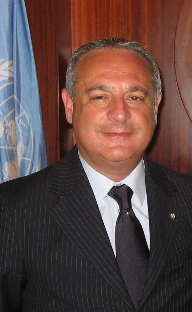 Luigi Pepe, italian journalist